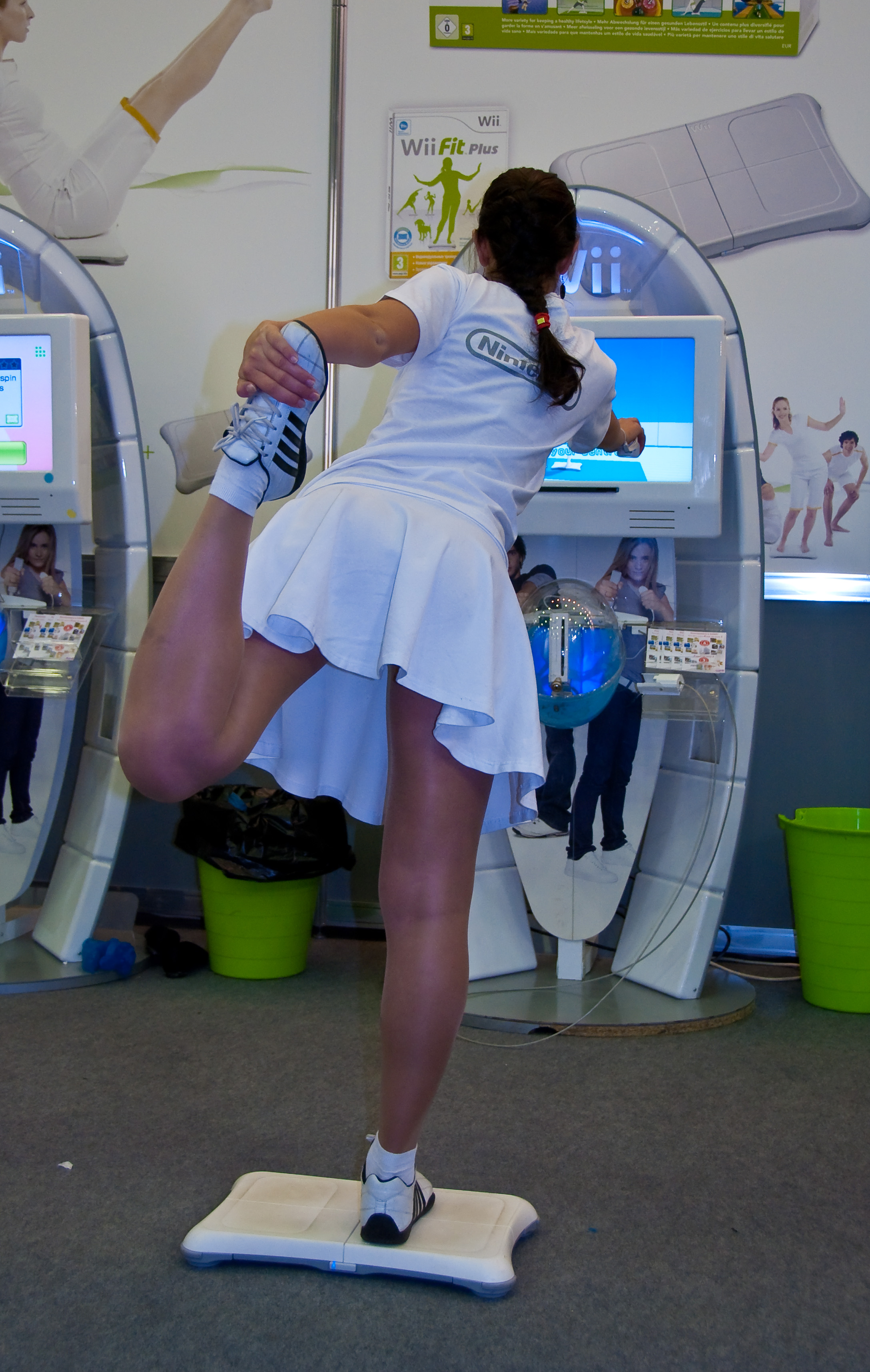 Wii Fit girl at Igromir 2009